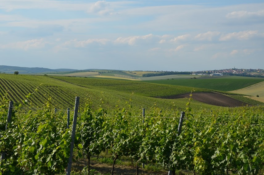 Velké Bílovice, vinohrady